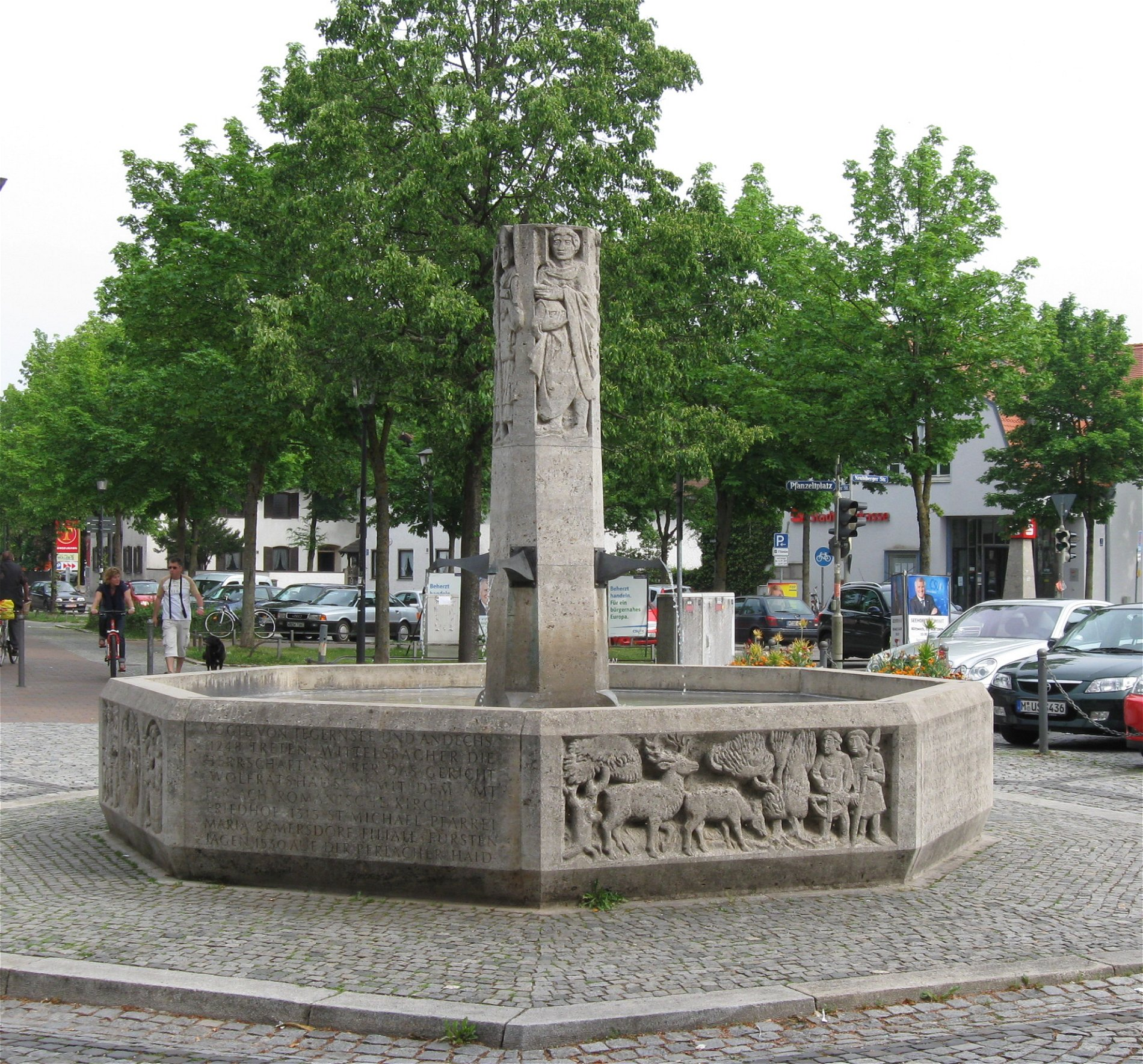 Geschichtsbrunnen am Pfanzeltplatz in Perlach, München, von Karl Oppenrieder (*1923 in München)